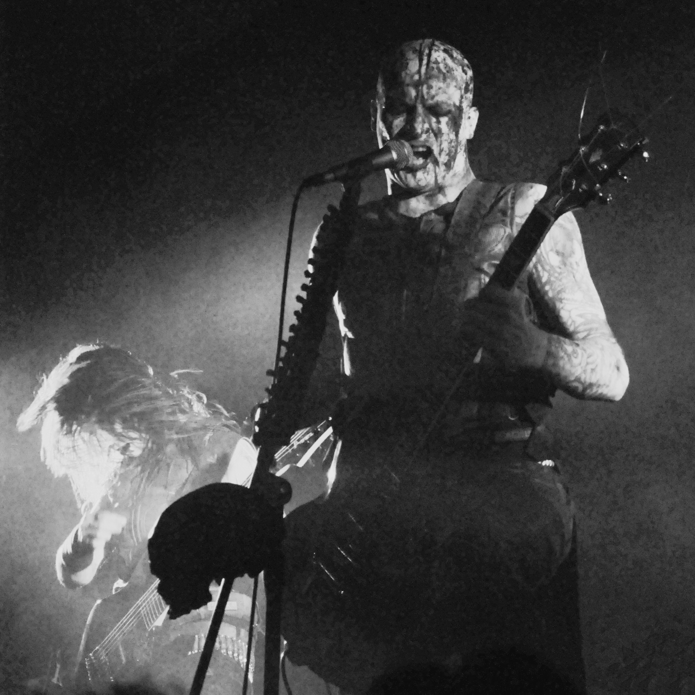 Otargos, groupe français de Black Metal, au Clandestine Fest à Saint-Just-en-Chaussée, le 30/05/09: Dagoth au chant et à la guitare.